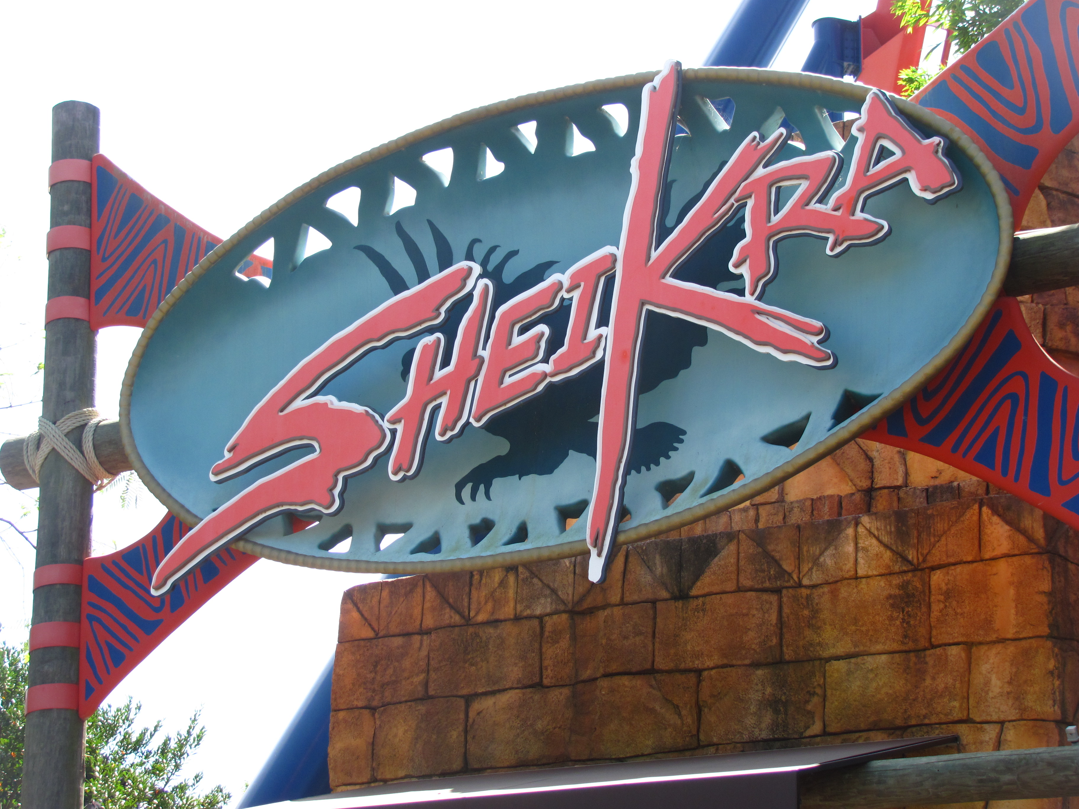 SheiKra